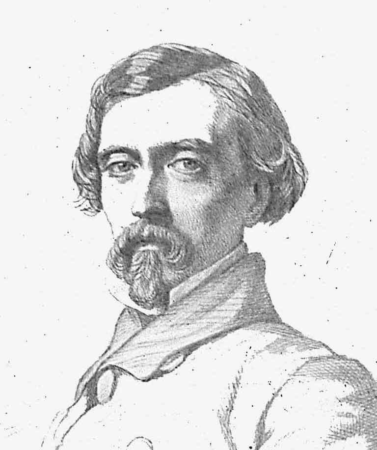 Eugenio de Ochoa. Litografía sobre dibujo de Federico de Madrazo (la imagen ha sido recortada, suprimiendo la firma y fecha y el facsímil de la firma del retratado. La litografía es anónima, atribuida a Domingo Martínez Aparici)